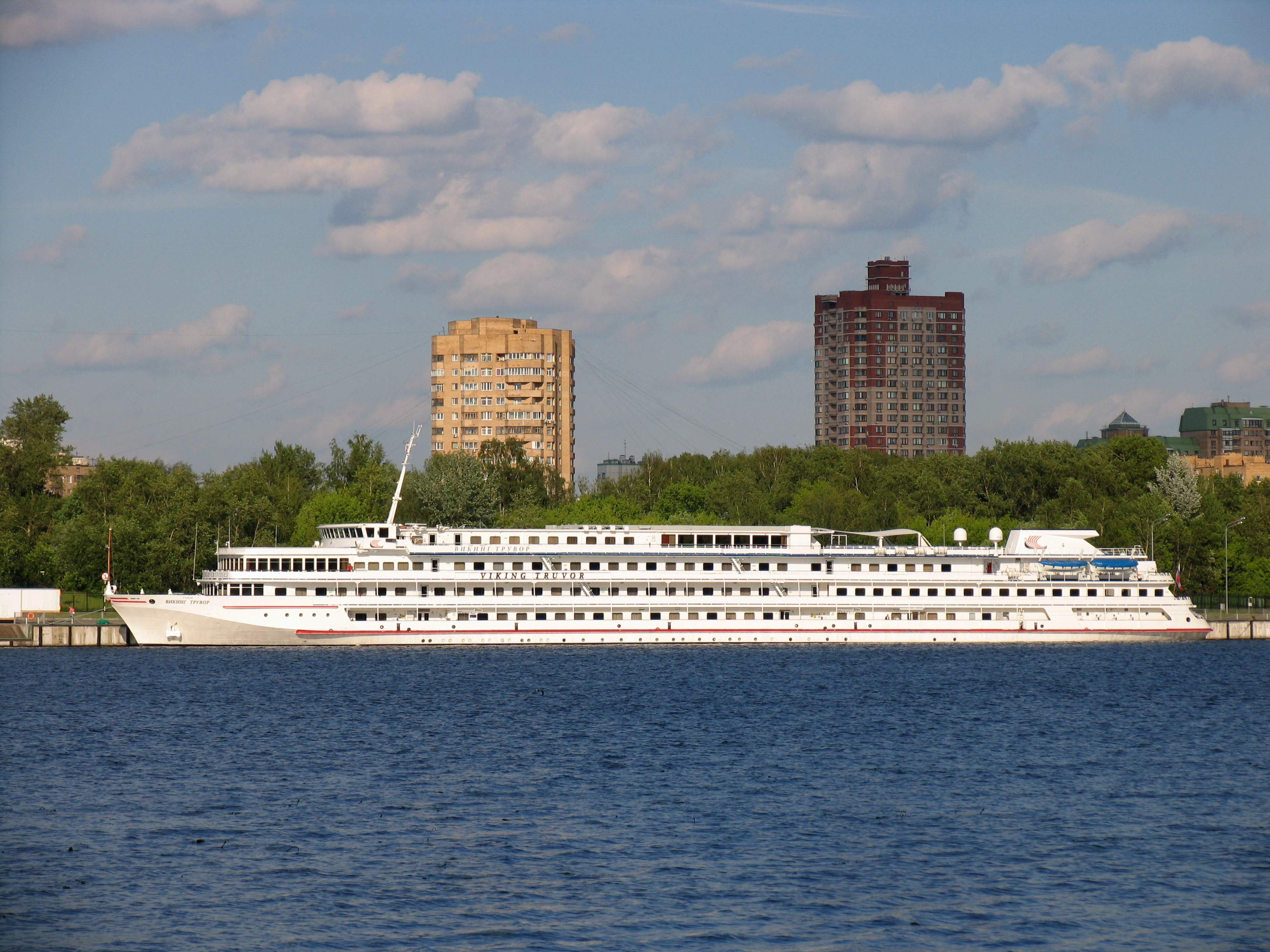 Речное круизное судно "Викинг Трувор" в Северном речном порту.